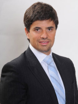 Marcelo Díaz Díaz